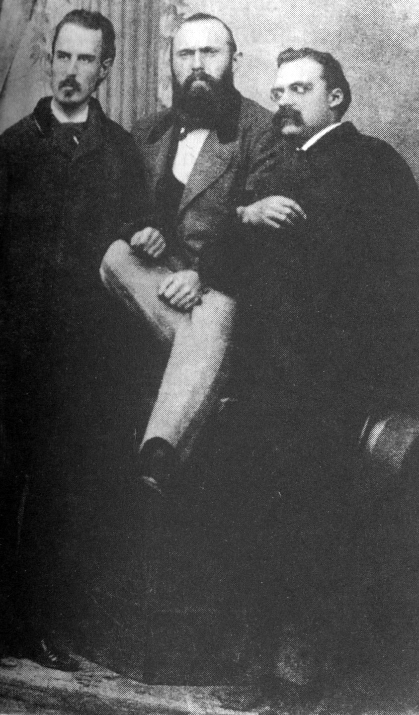 Photography of Erwin Rohde, Carl von Gersdorff and Friedrich Nietzsche